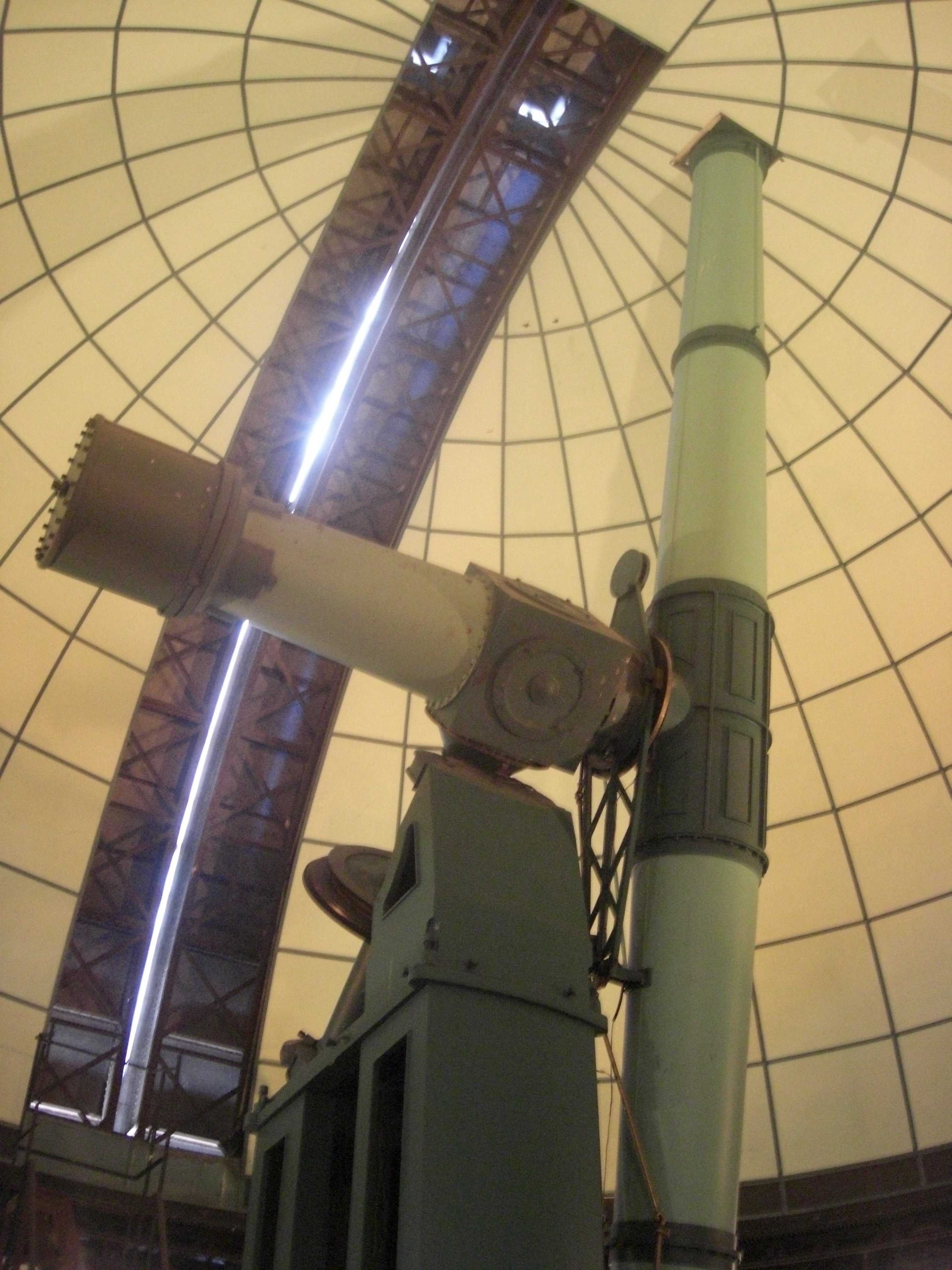 Telescopio "Gran Ecuatorial" (1891) de la facultad de ciencias astrónomicas y geofísicas de La Plata, Argentina. el telescopio es uno de los varios que estan en el campus de la UNLP.